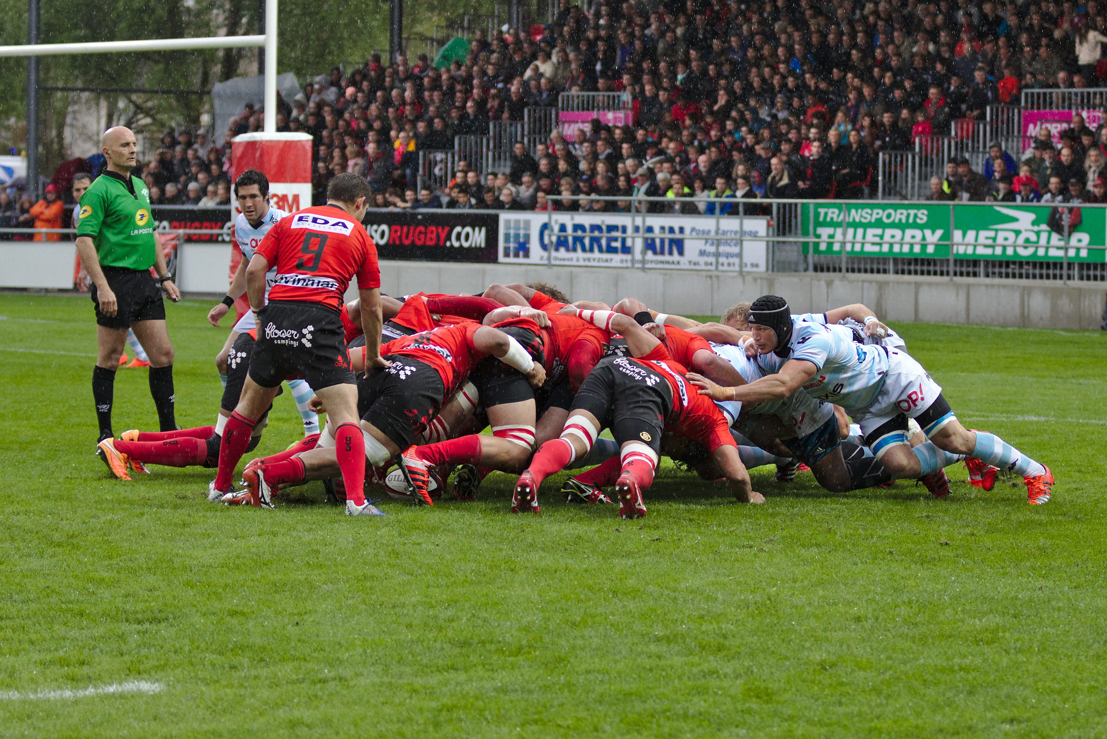 USO - RM92 - 20150425